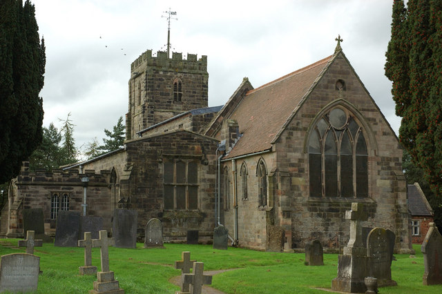 Kirk Langley Church